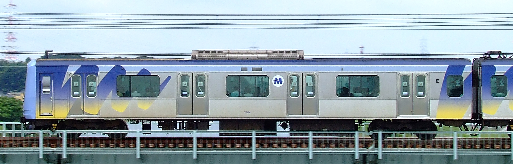 横浜高速鉄道Y500系（Y504）側面流し撮り 綱島～大倉山間にて